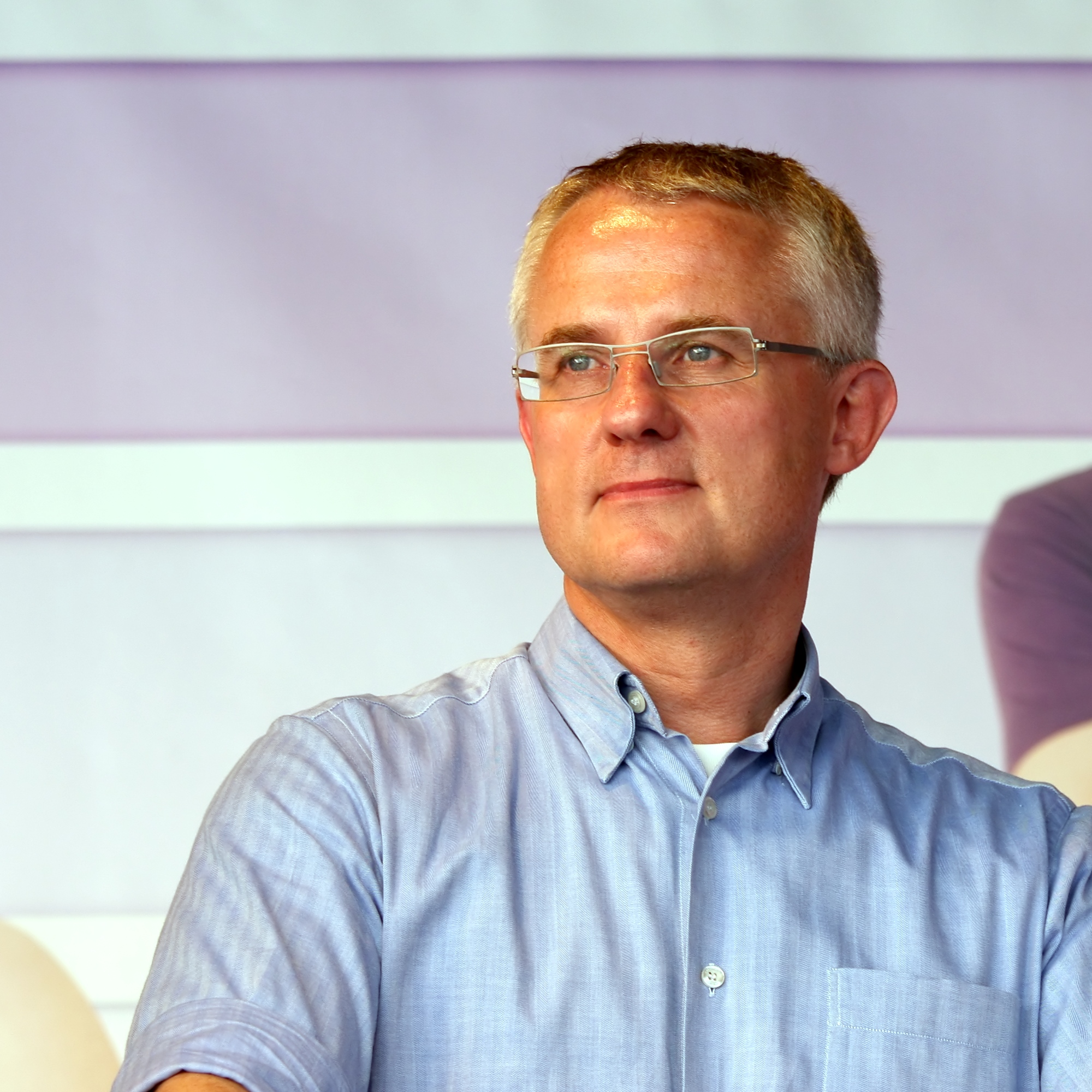 Peter Kurth beim „Kandidaten-Check zur Kommunalwahl 2009“ auf der Politur-Bühne „Politik trifft Kultur“ auf dem Alter Markt, Köln. Bühnenprogramm zum CSD-Straßenfest/ColognePride 2009. Peter Kurth unterlag bei der OB-Wahl am 30.8.2009.